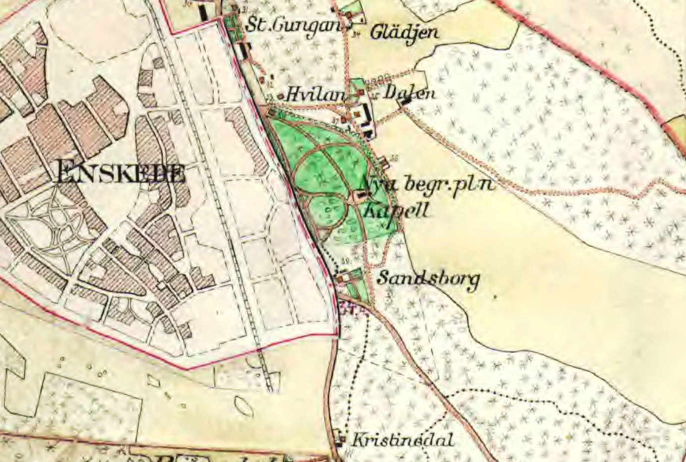 Sandsborg, Stora Gungan, Glädjen, Hvilan, Dalen, Kristinedal och Nya Södra begravningsplatsen